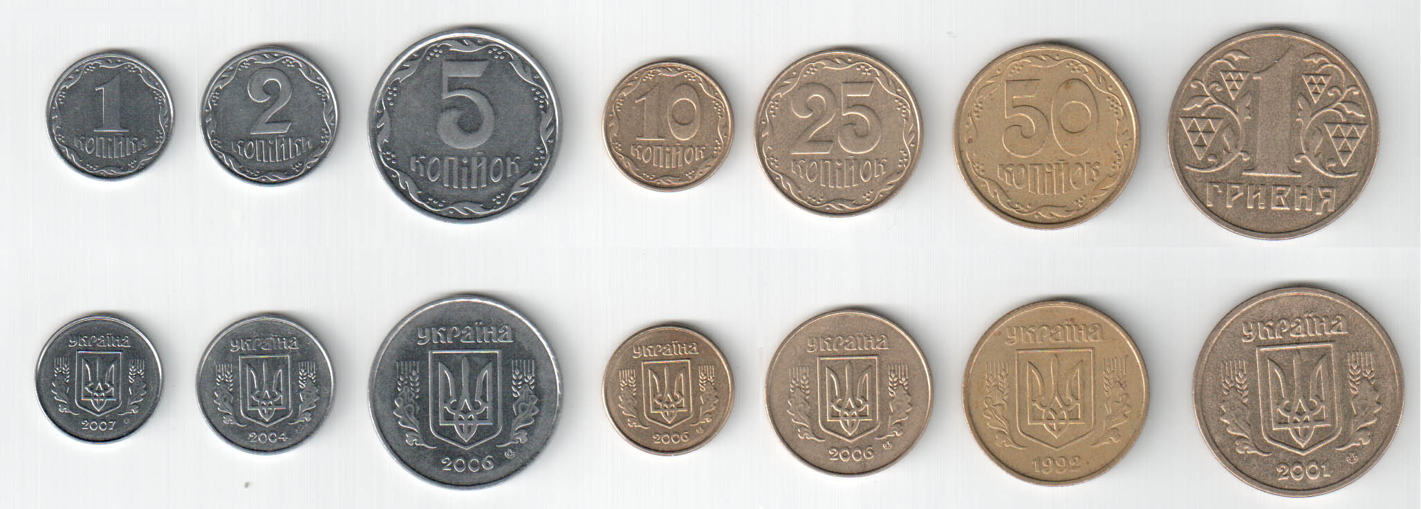 Монеты Украины достоинством в 1, 2, 5, 10, 25, 50 копеек и 1 гривну.